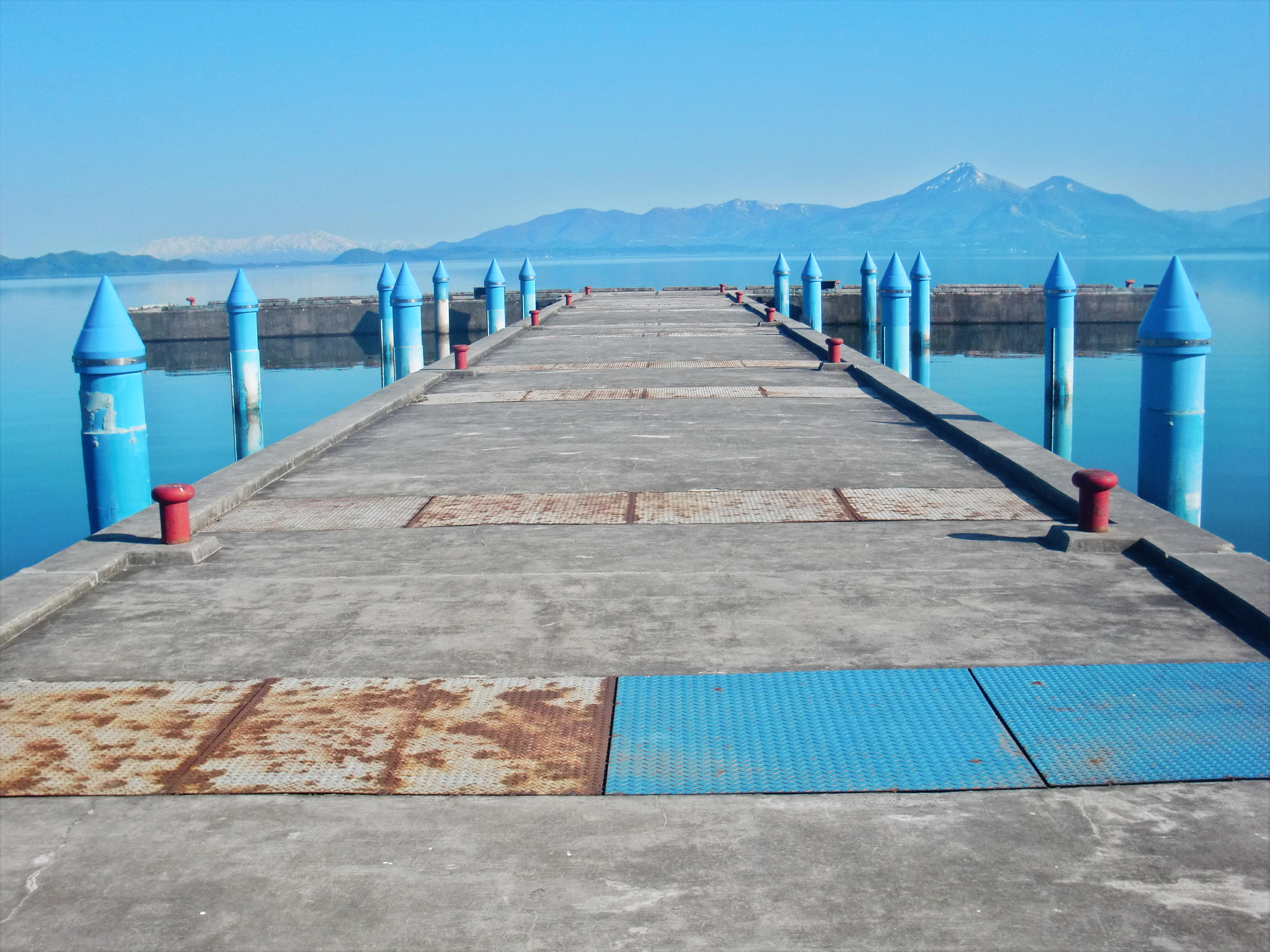 猪苗代湖 郡山市の湖南港 桟橋と磐梯山